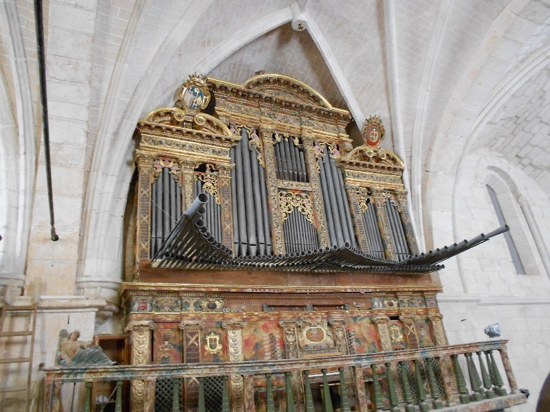 Órgano Barroco del S. XVII, regalo de Fray Pedro de Oviedo y Falconi a su Monasterio de Santa María de Huerta, Soria, España. El órgano está en la Iglesia, en el lateral derecho de los sitiales del coro.